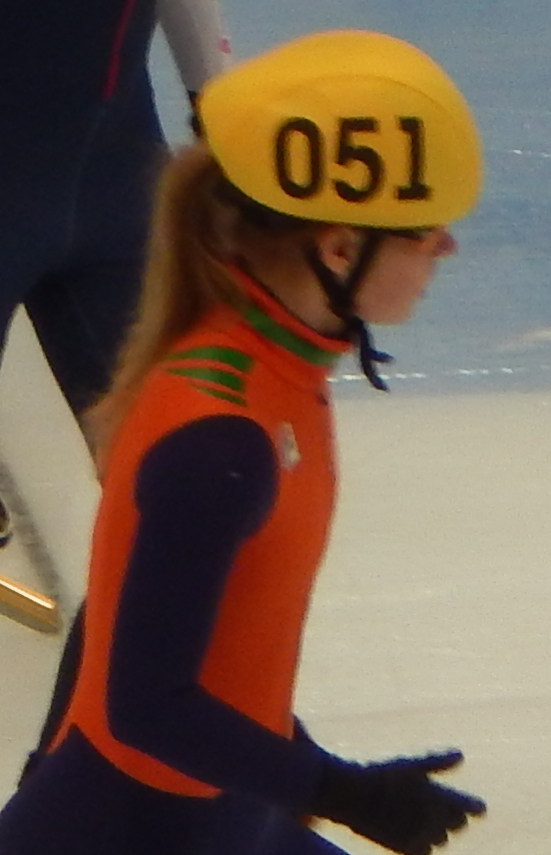 Чемпионат мира по шорт-треку 2015 в Москве Квалификационный раунд, 9 забег, 1000 м, Женщины